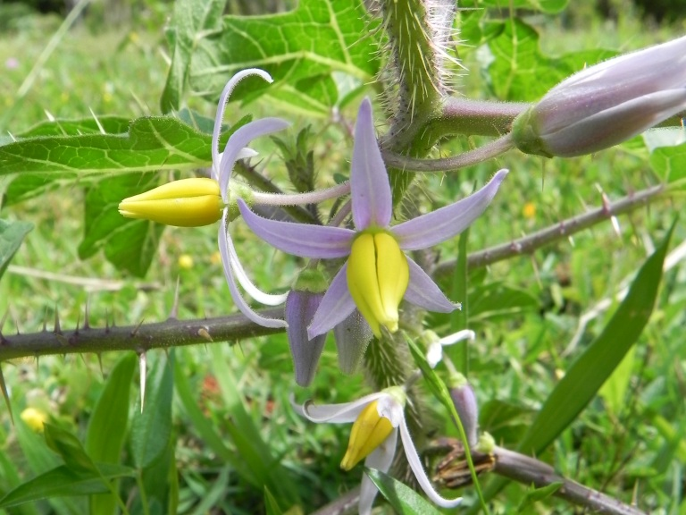 Solanum palinacanthum - SOLANACEAE - SQN 311 - Brasília - Distrito Federal - Brasil.